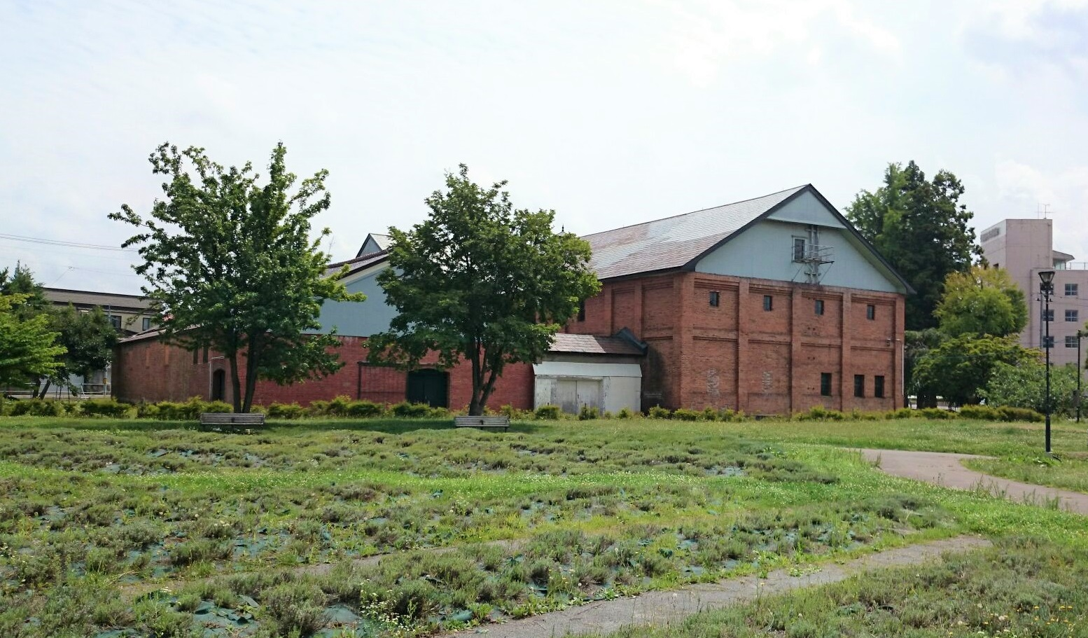 吉野町煉瓦倉庫外観